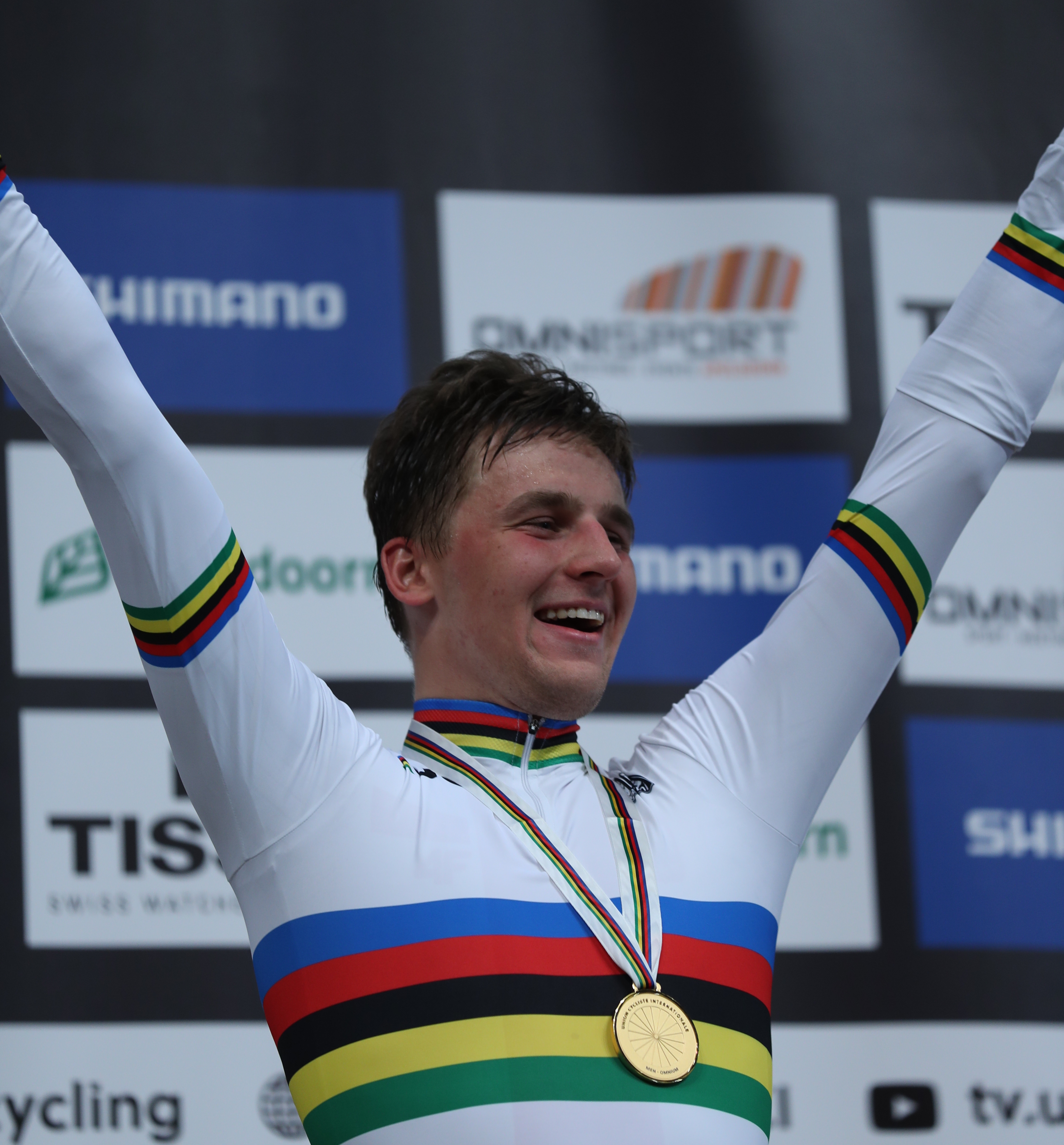 Szymon Sajnok, polnischer Radsportler - Weltmeister im Omnium